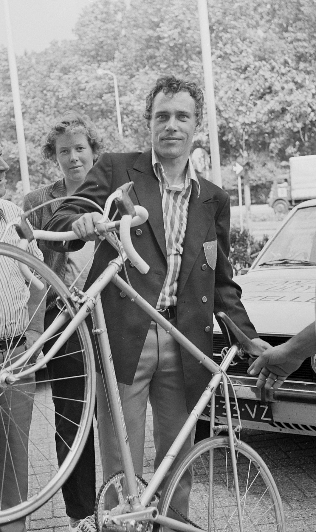 Jan Krekels met fiets voor Tour de France , rechts ploegleider Ton Vissers